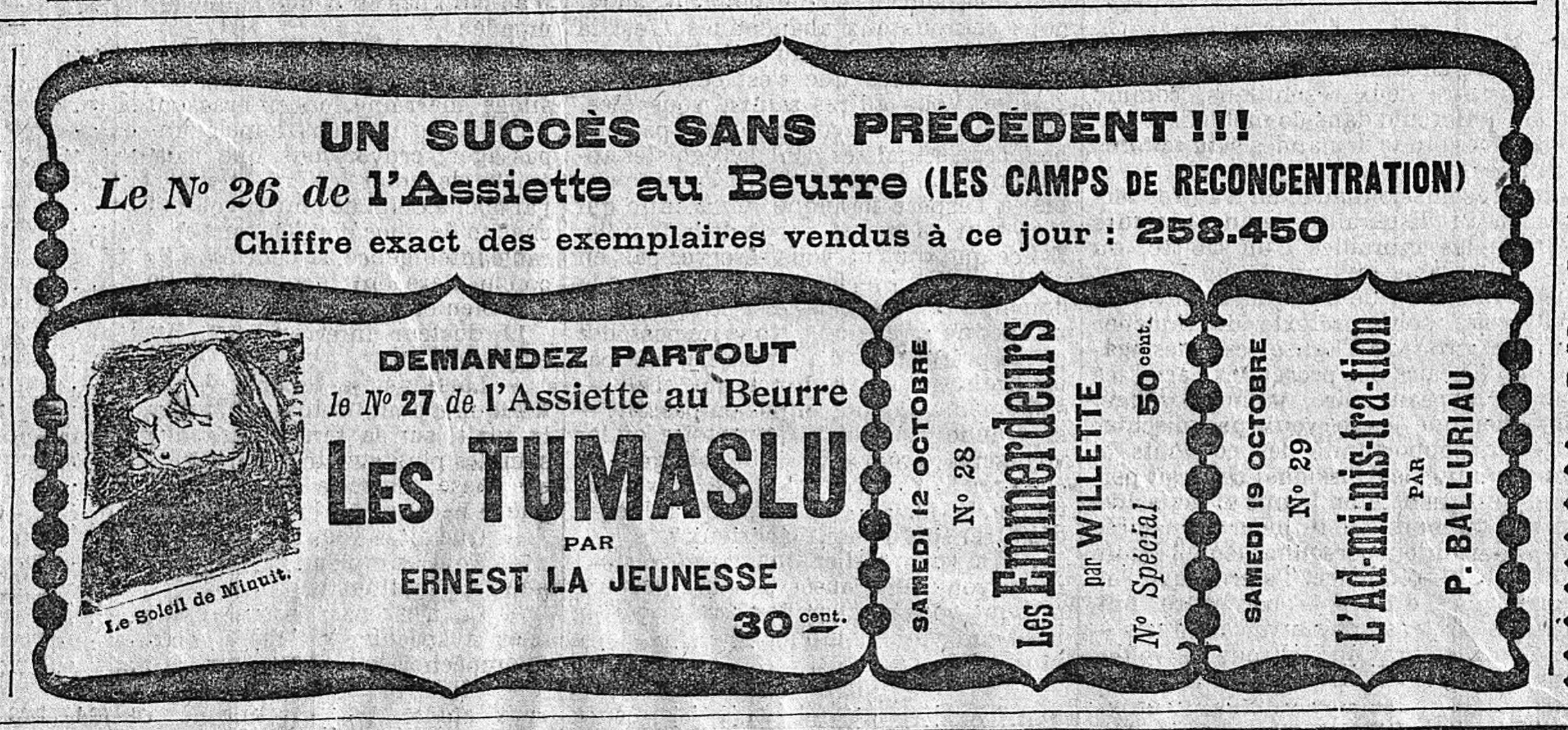 Advertisement in Le Figaro